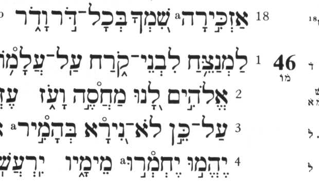 Eigen scan van een rechtenvrije tekst.